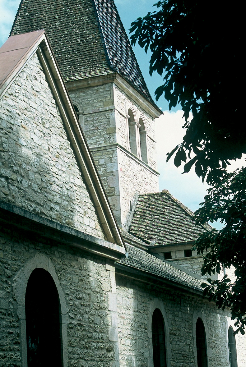 L'église Saint-Denis de Lugny (détail).